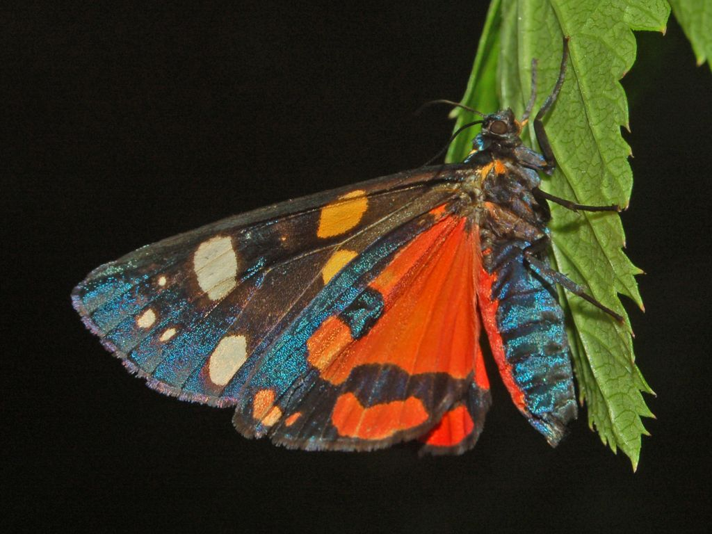 Arctiidae - Callimorpha dominula